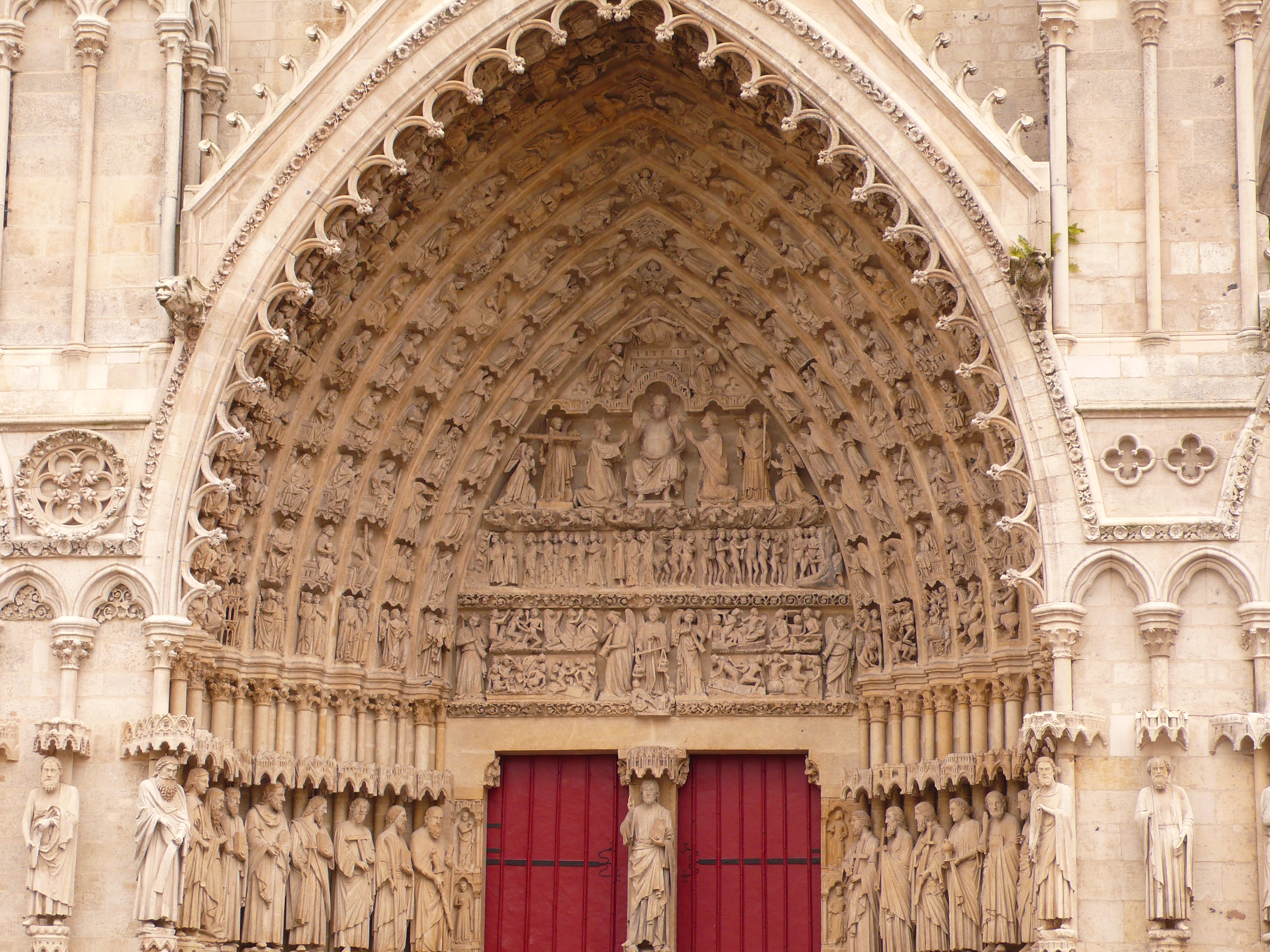 Kathedrale von Amiens, Frankreich, Westfassade, Hauptportal, Trumeau mit Beau-Dieu, Apostelfiguren und Tympanon